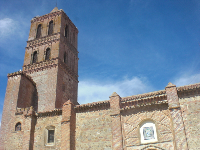 Flanka fasado